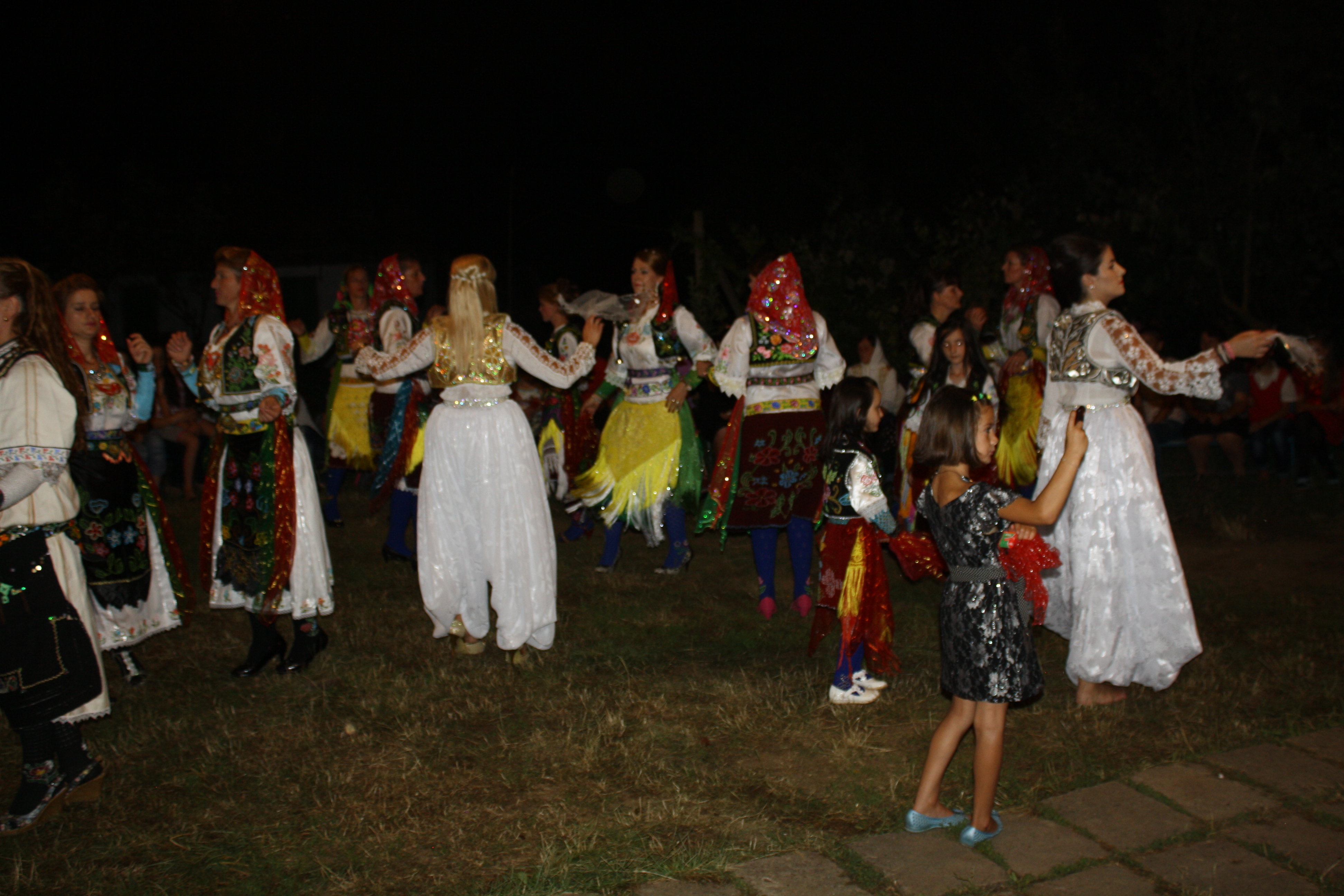 kercim i grave me veshje popullore tradicionale